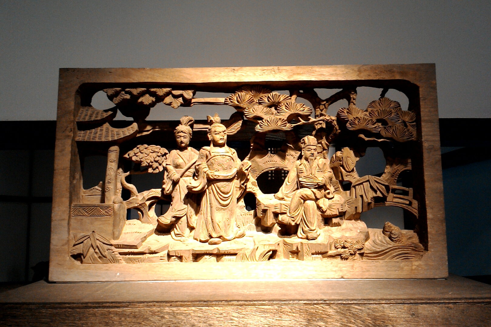 藝師館內的「孔明安居平五路」木雕.jpg,桃園市大溪區興和里